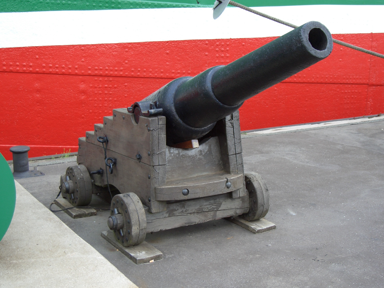 Rapert (in der Segelschiffszeit Bezeichnung für die Lafette der Kanone.)